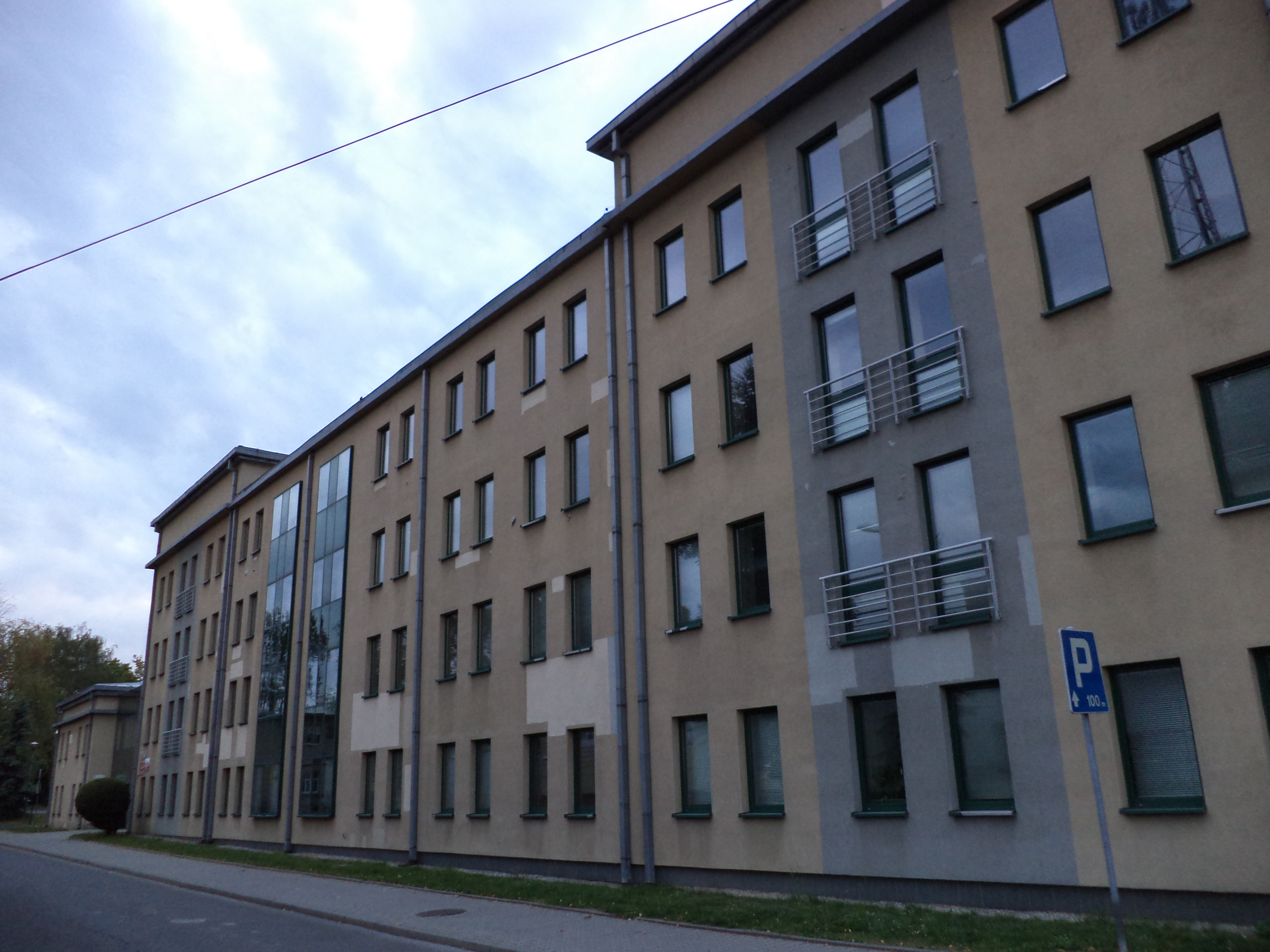 Budynek starostwa powiatowego w Tarnowskich Górach, ul. Karłuszowiec 5